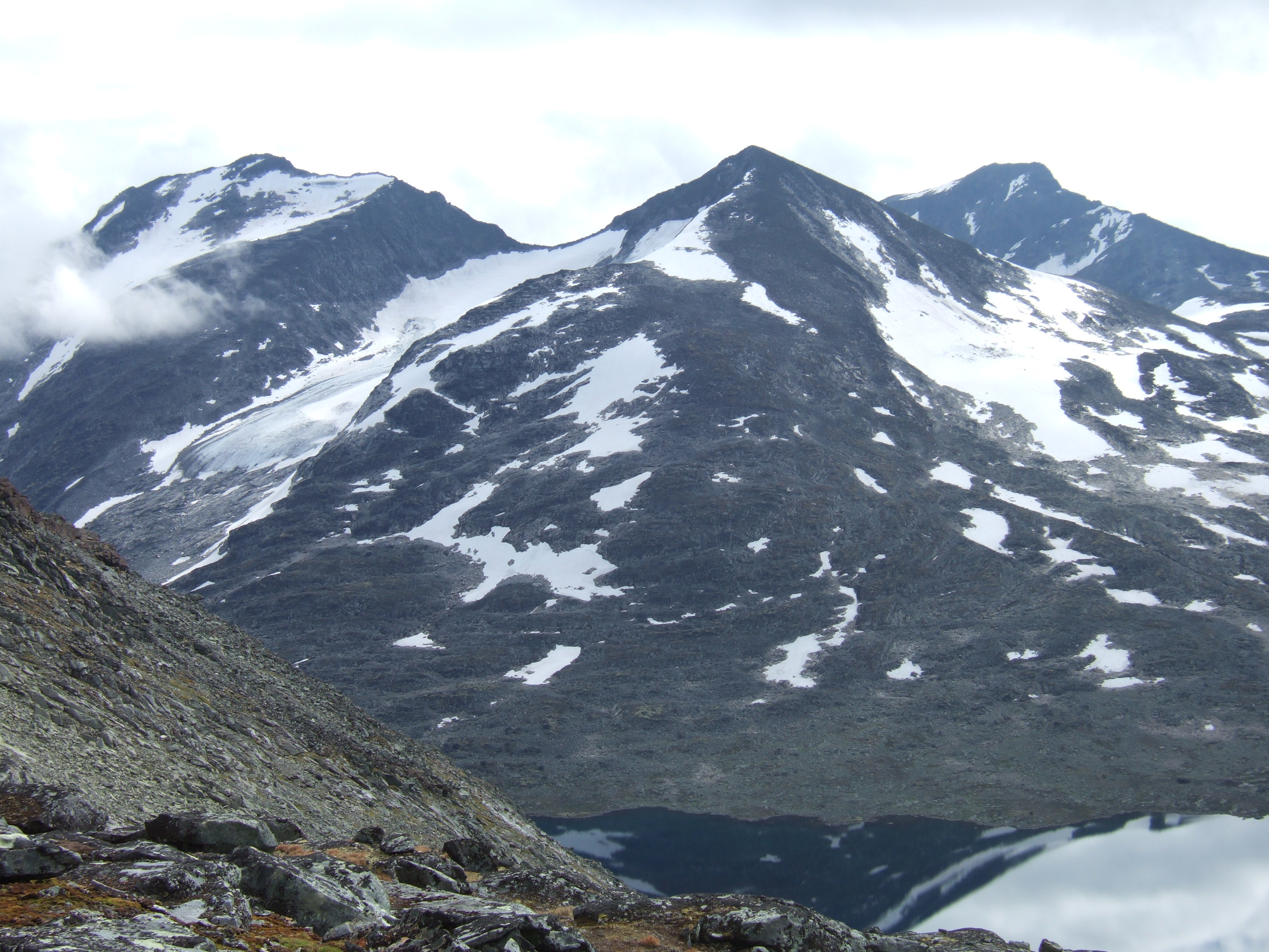 Skardalstind sett fra Midtre Høgvagltinden, Jotunheimen.